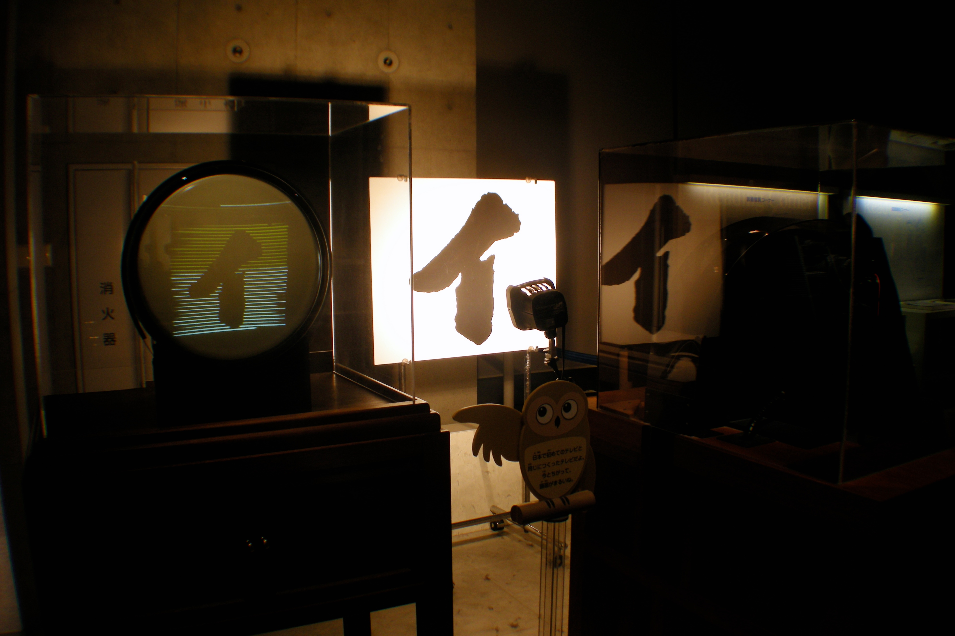 Day 5, Ueno koen, Shibuya [1]